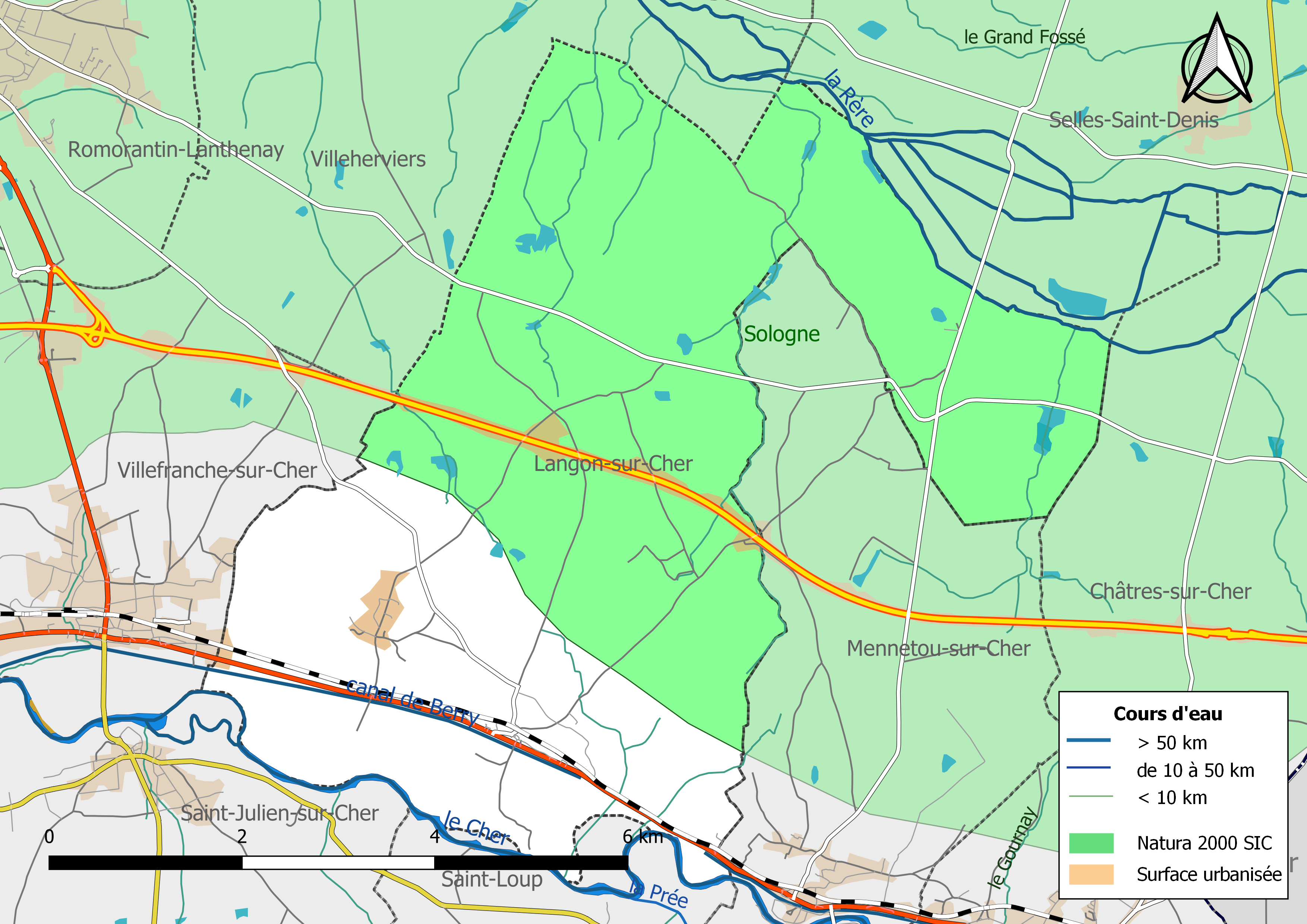 Zones Natura 2000 de type SIC de la commune de Langon-sur-Cher (Loir-et-Cher, France).